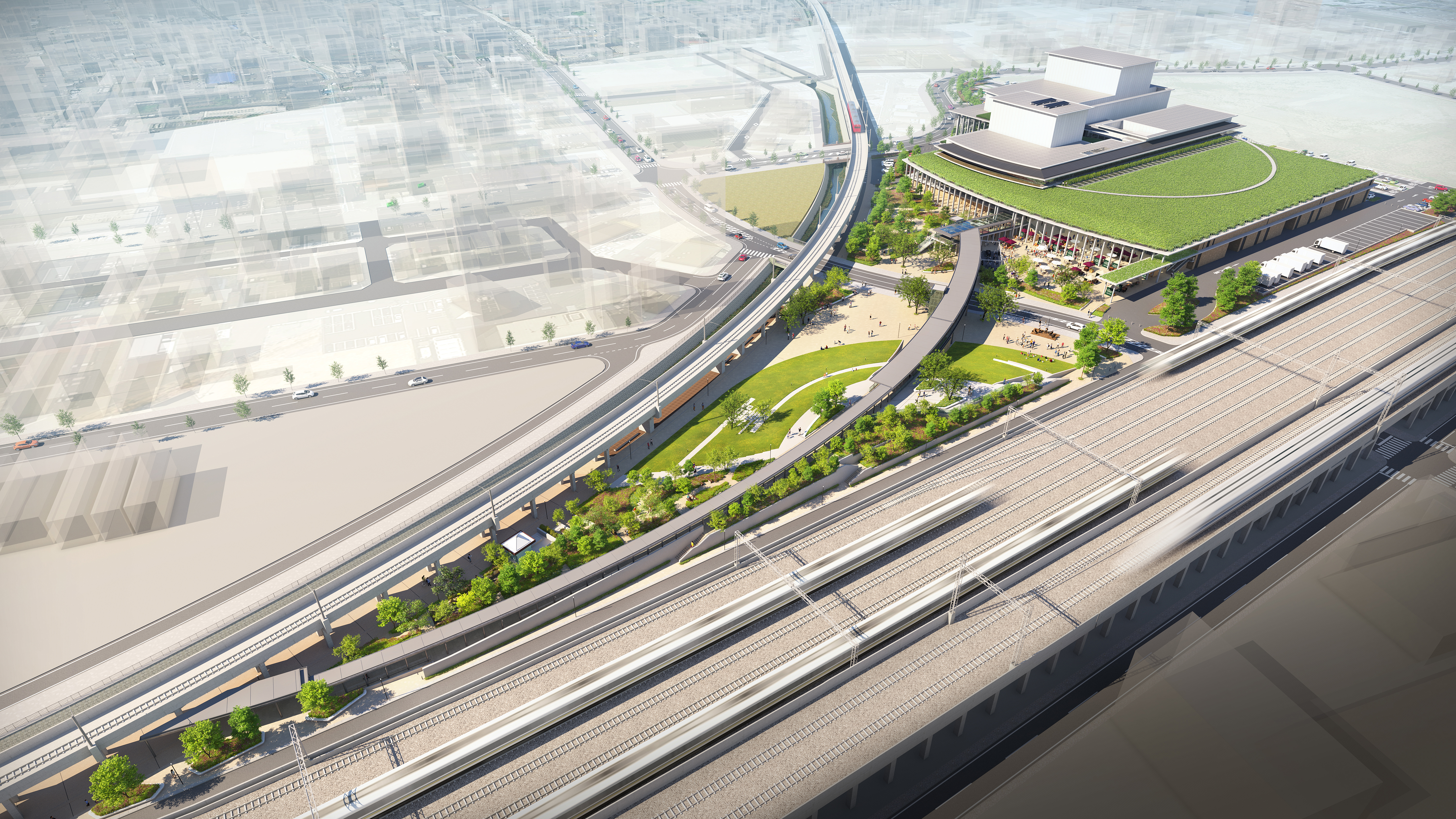 姫路市文化コンベンションセンターの設計段階におけるイメージ画像である。